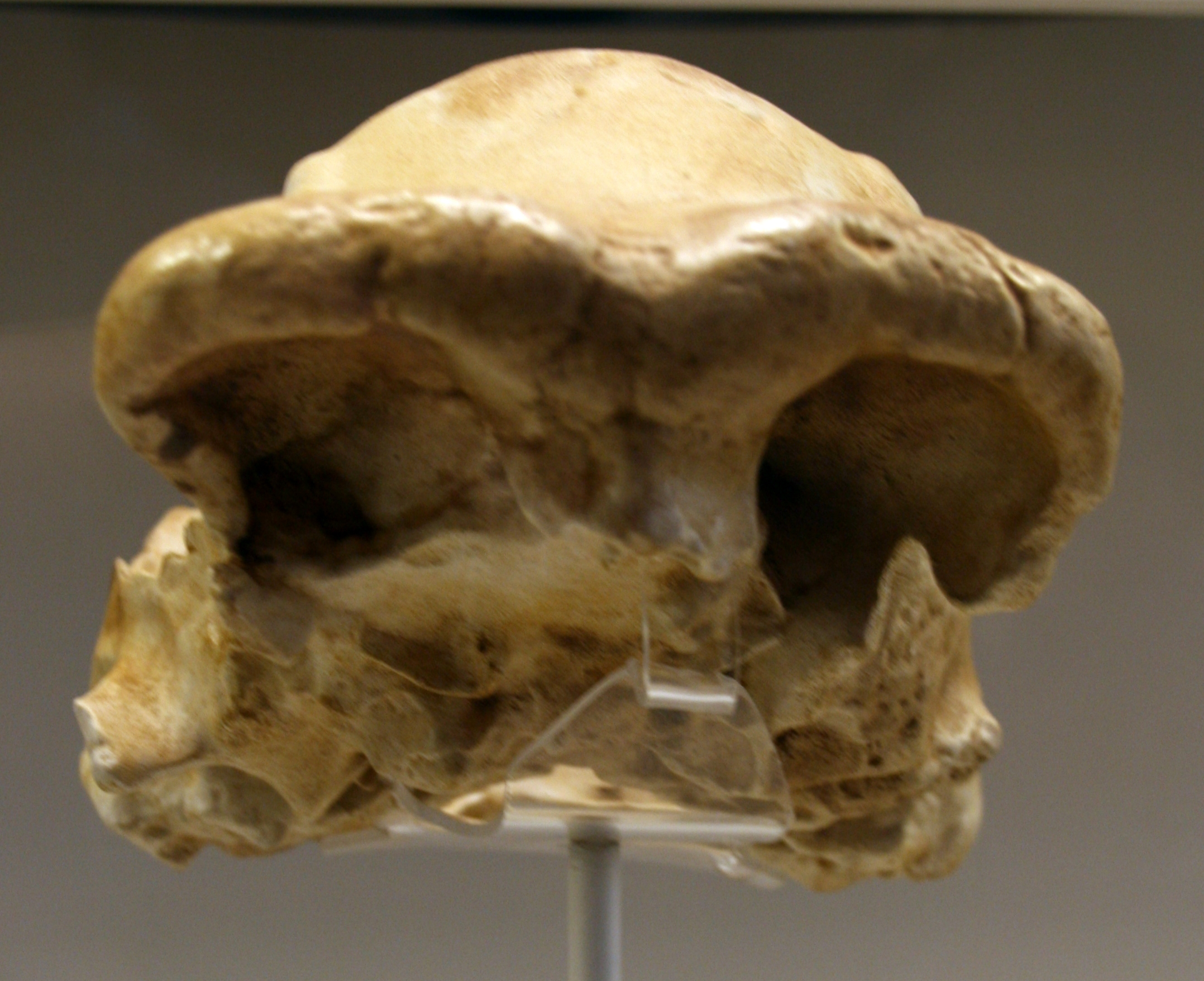 Cráneo de Homo erectus / ergaster. OH 9. Réplica Original: LLK, Garganta de Olduvai (Tanzania) 1,25 millones de años Museo Nacional de Dar Es Salaam, Tanzania Réplica: Instituto de Evolución en África, IDEA, Madrid Exhibido en exposición temporal, "La cuna de la humanidad", en el Museo Arqueológico de Regional de Madrid